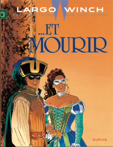 Couverture d'un des albums de Largo Winch (bande dessinée)